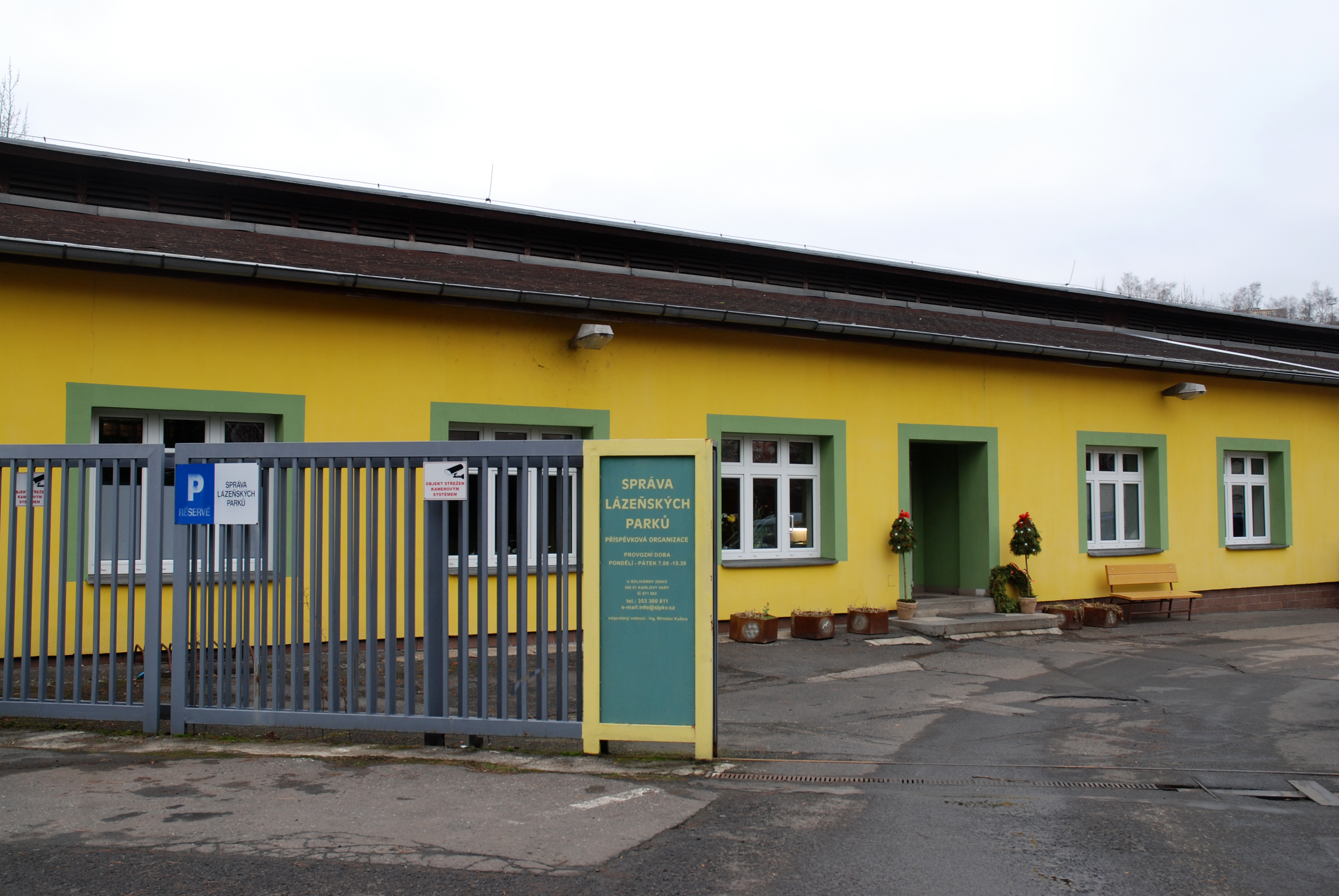 Sídlo příspěvkové organizace Správa lázeňských parků v Karlových Varech